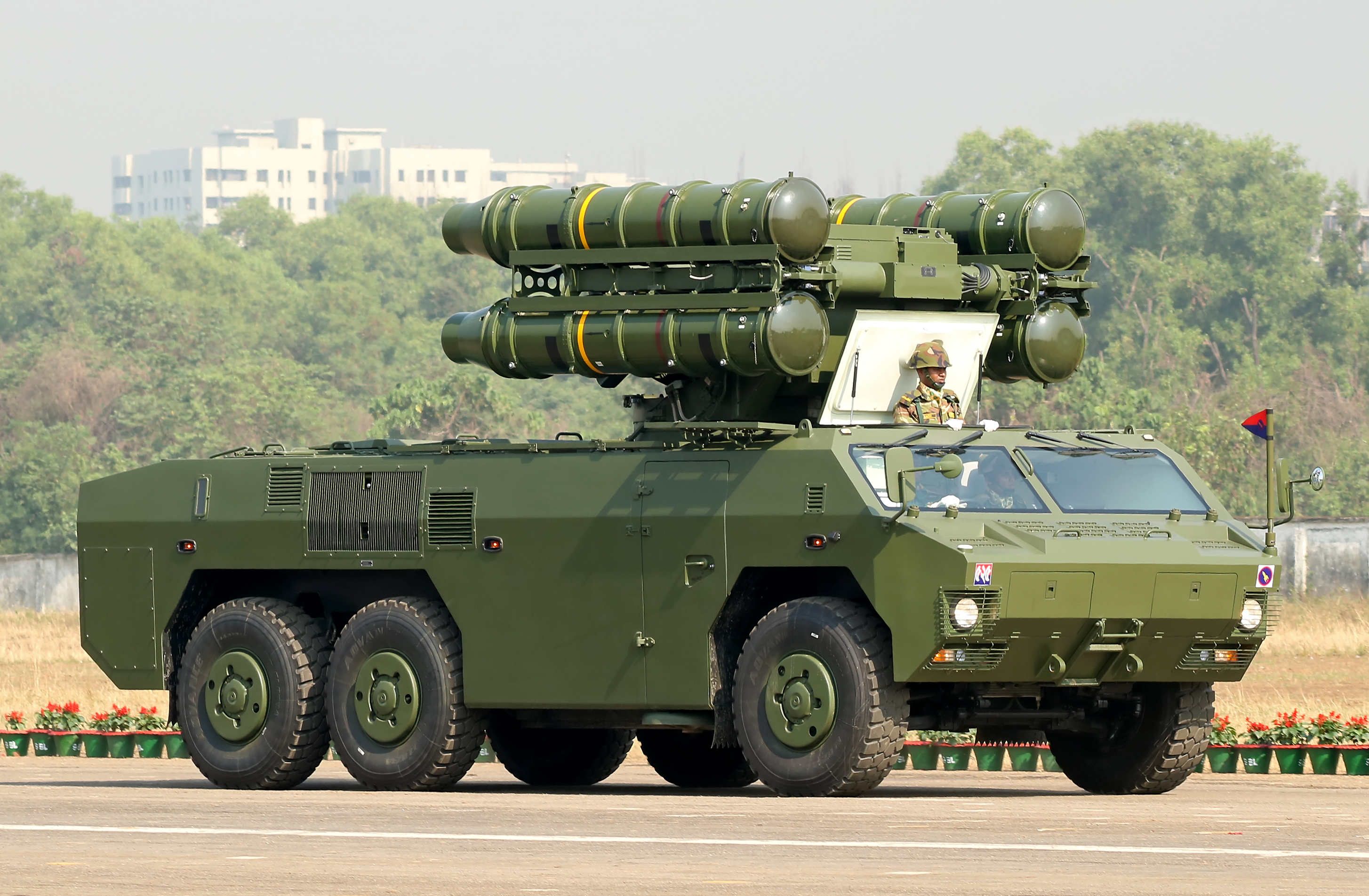 VGTJ/ VDP2017.